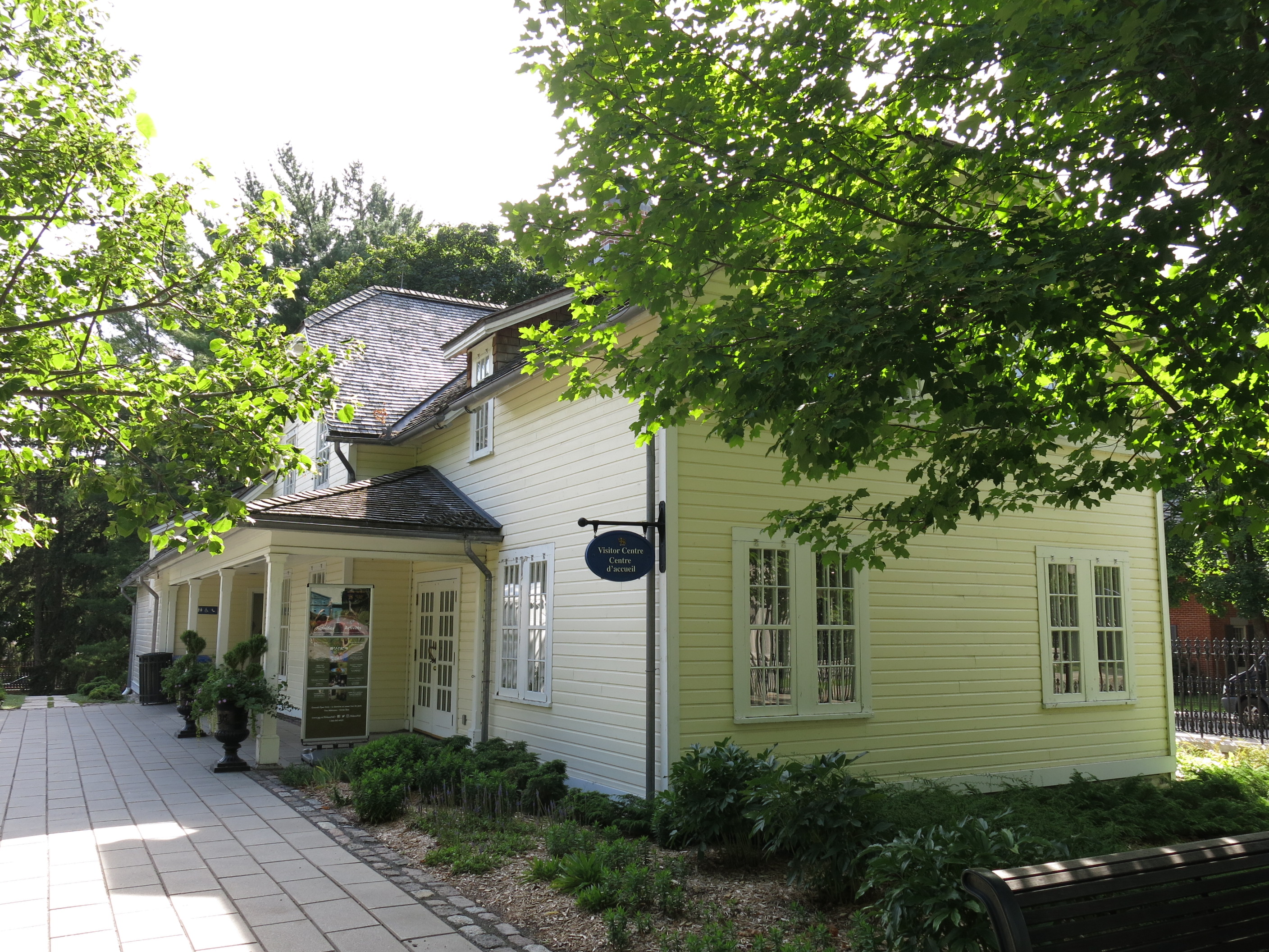 Rideau Hall, le complexe dans son ensemble, 1 Sussex Drive, Ottawa (Canada). (Protection Classified Federal Heritage Building. Voir la liste des lieux patrimoniaux d'Ottawa pour plus de détails).